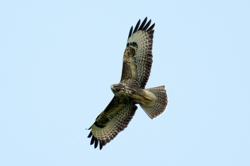 buizerd-1.jpg